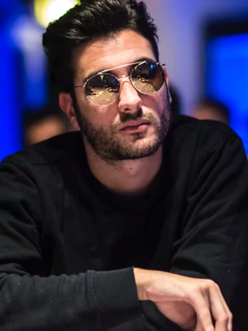 Dario Sammartino bei der WPT Wien